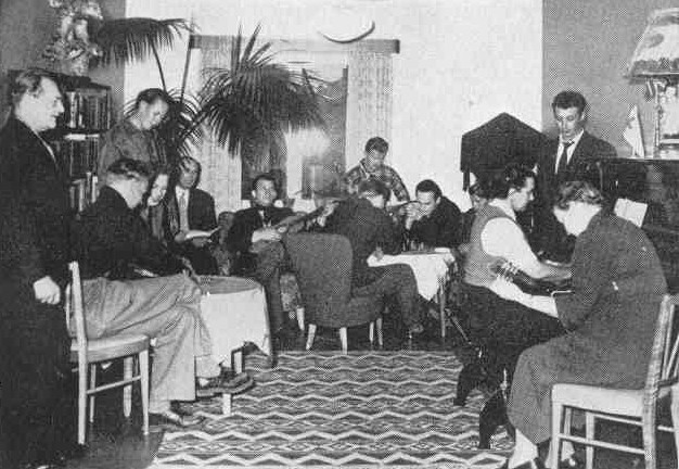 Holmsunds sjömanshem som öppnades 1953. Numera har hemmet nya lokaler i Umeå uthamn.